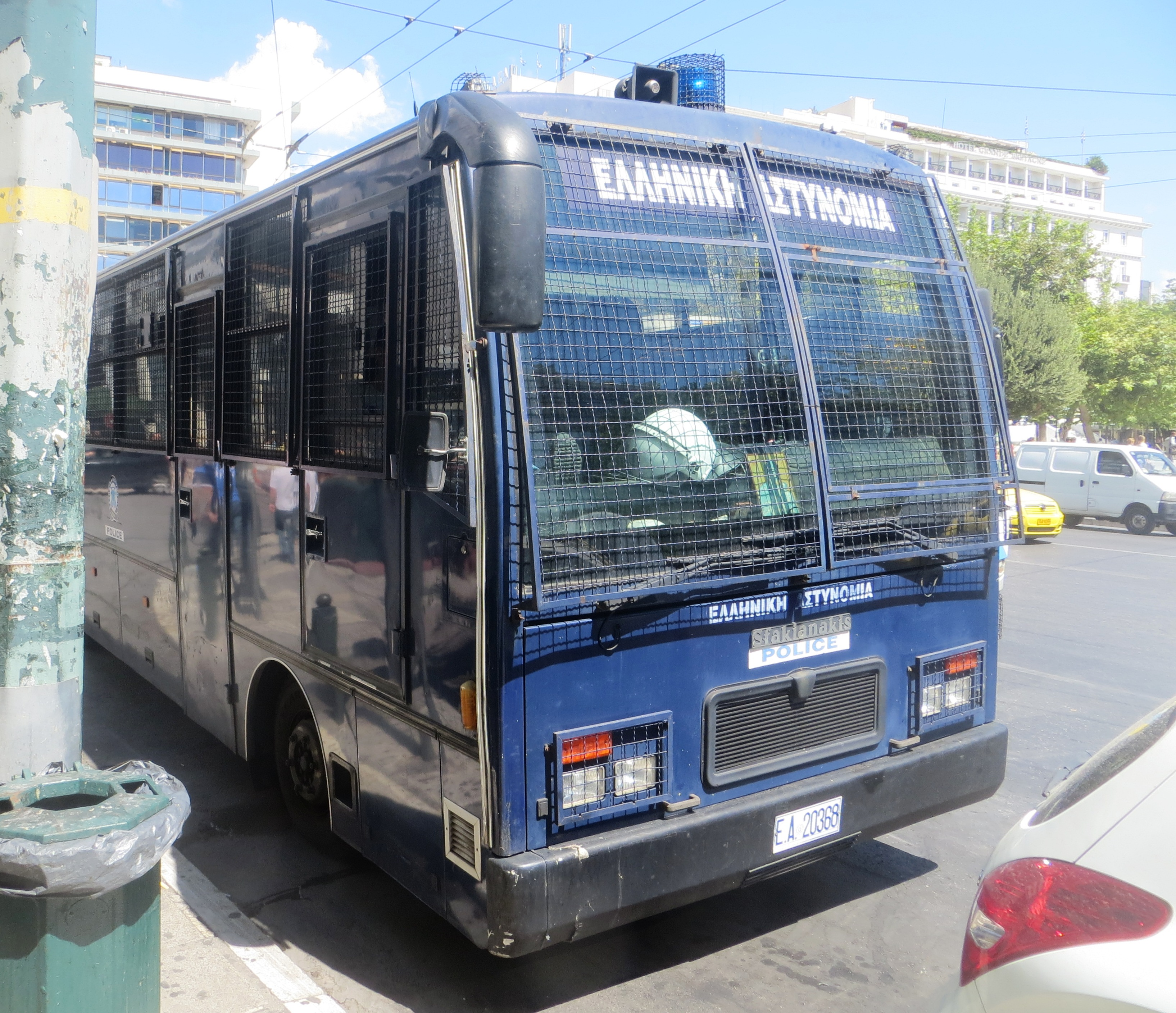 Griekse politieauto